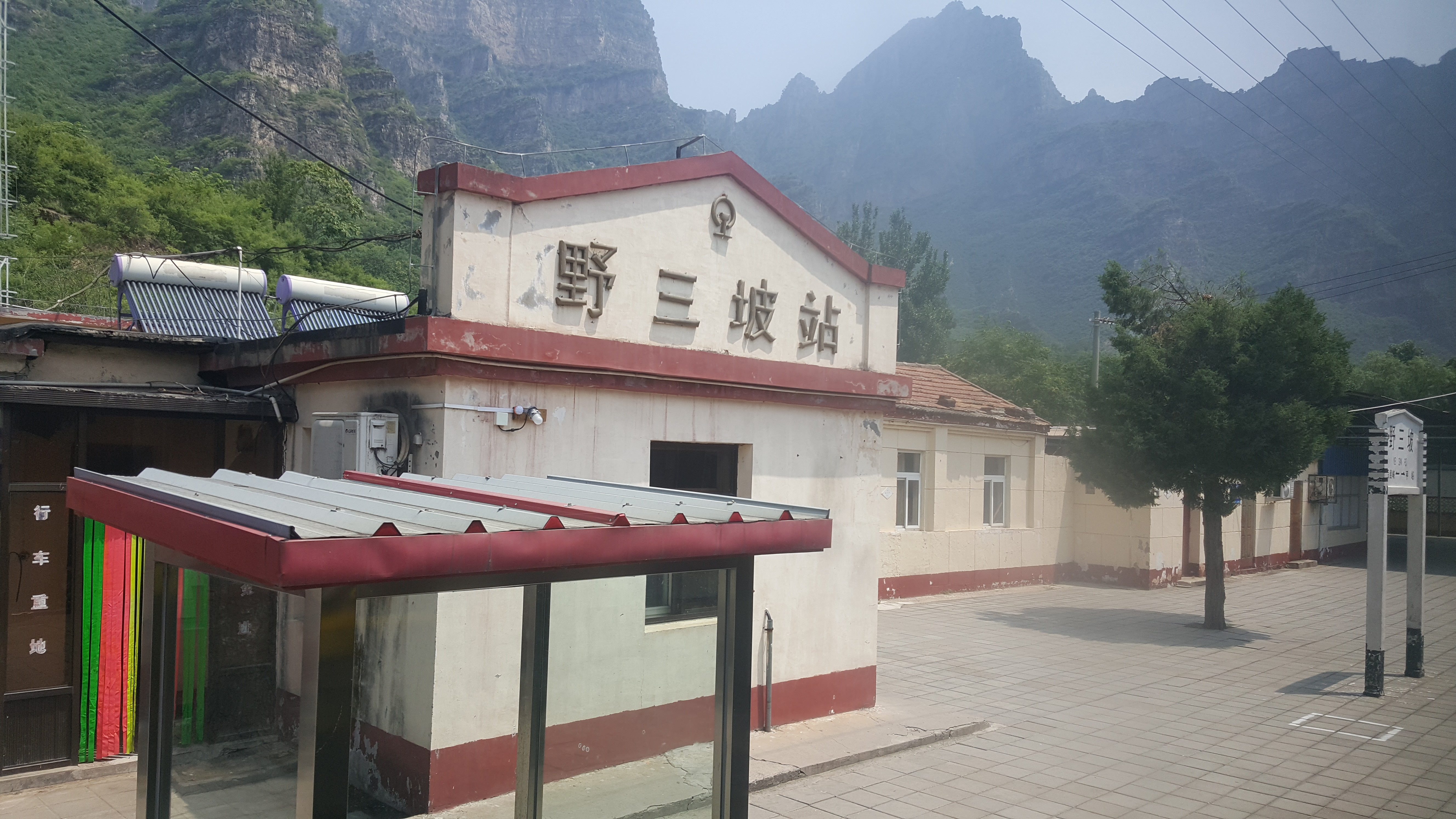 中文（中国大陆）: 野三坡站站房内侧